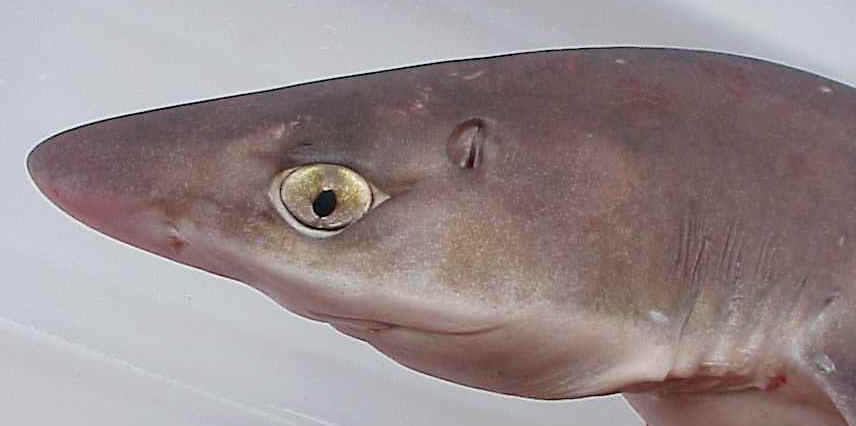 Tête de requin aiguillat